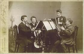 Fotografie des Brode-Quartetts, Königsberg i. Pr.